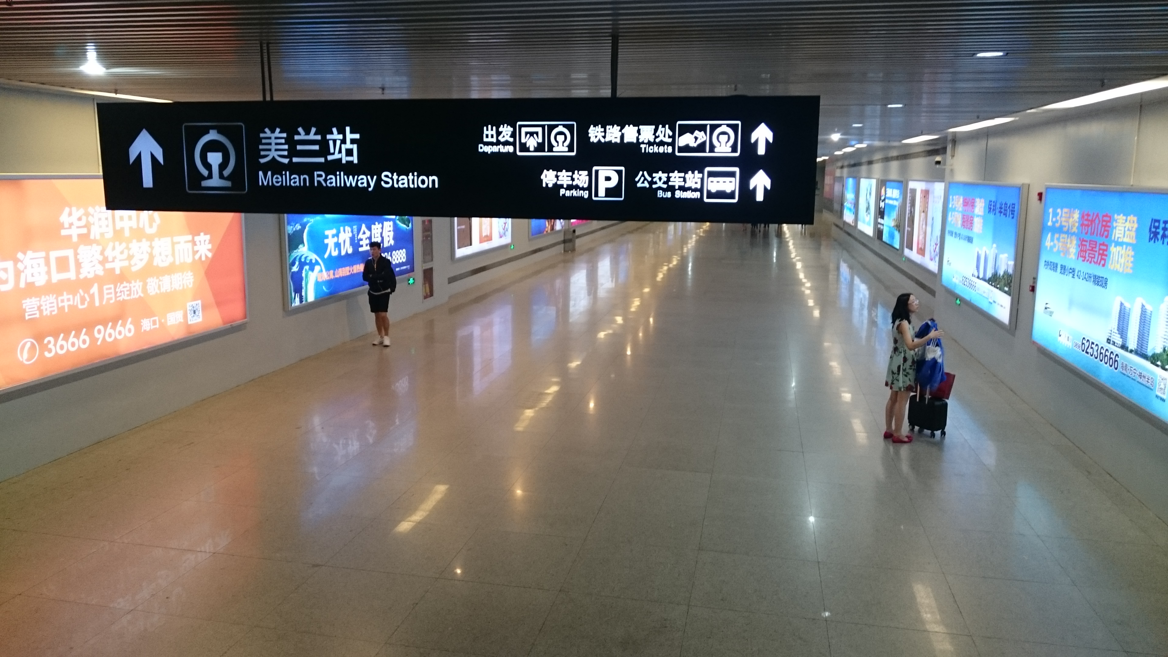 中国海南環東高鉄美蘭駅地下道入口(美蘭国際空港から)